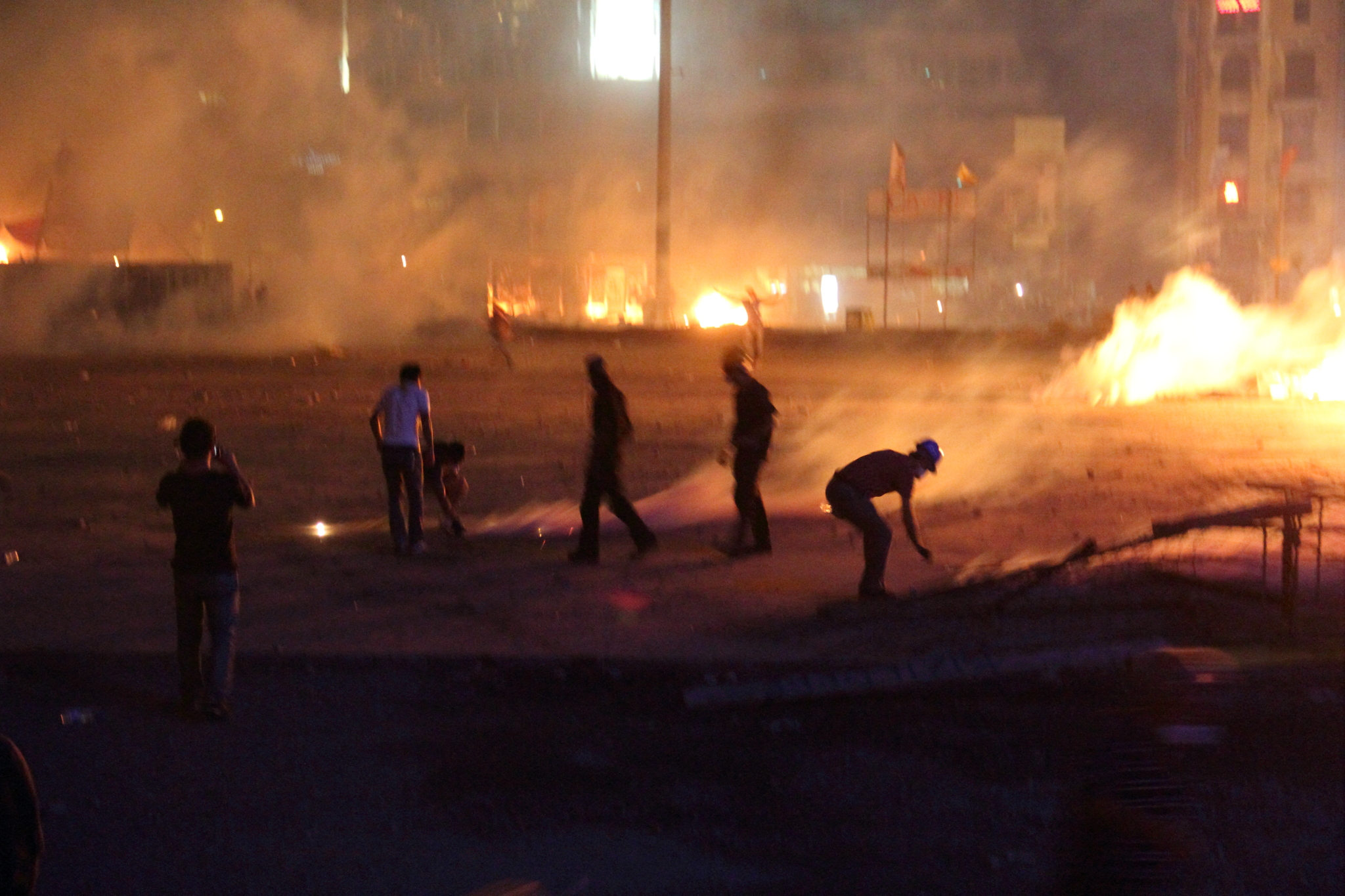 Gezi Parkı Müdahale